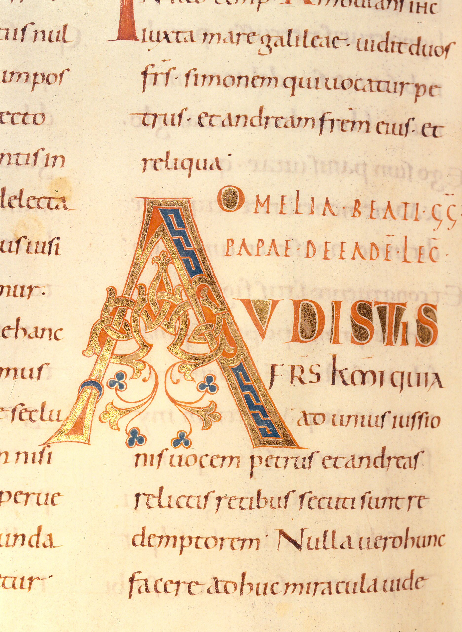 Lektionar, Reichenau, 2. Drittel des 10. Jahrhunderts Manuscript in the Badische Landesbibliothek, Karlsruhe, Germany Cod. Aug. perg. 16, Bl. 225v